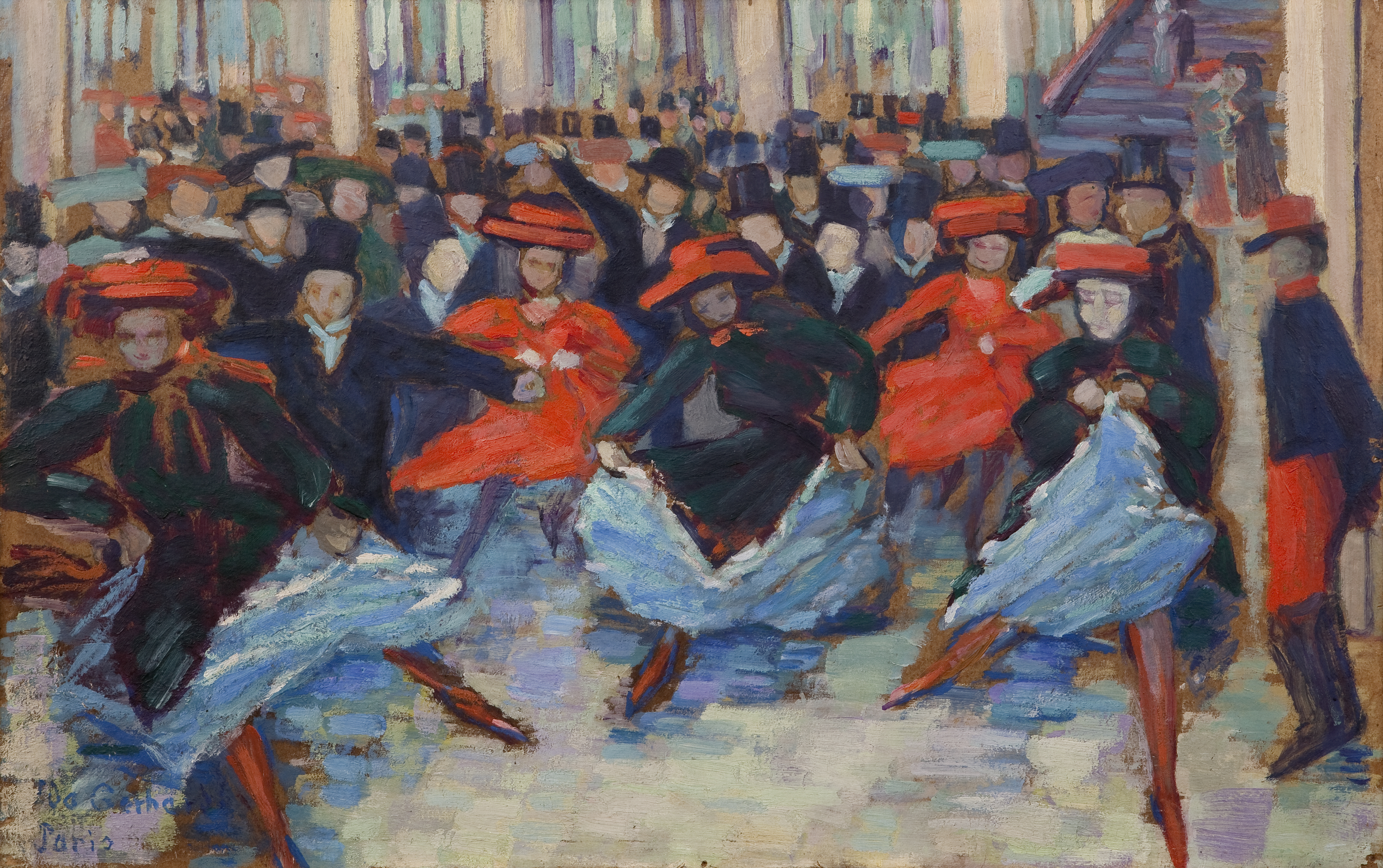 Tanzbild VIII (Can-Can Tänzerinnen bei Bullier), um 1904, Öl auf Pappe, 31 x 49 cm, Städtische Galerie Lüdenscheid. Foto: Steffen Schulte-Lippern